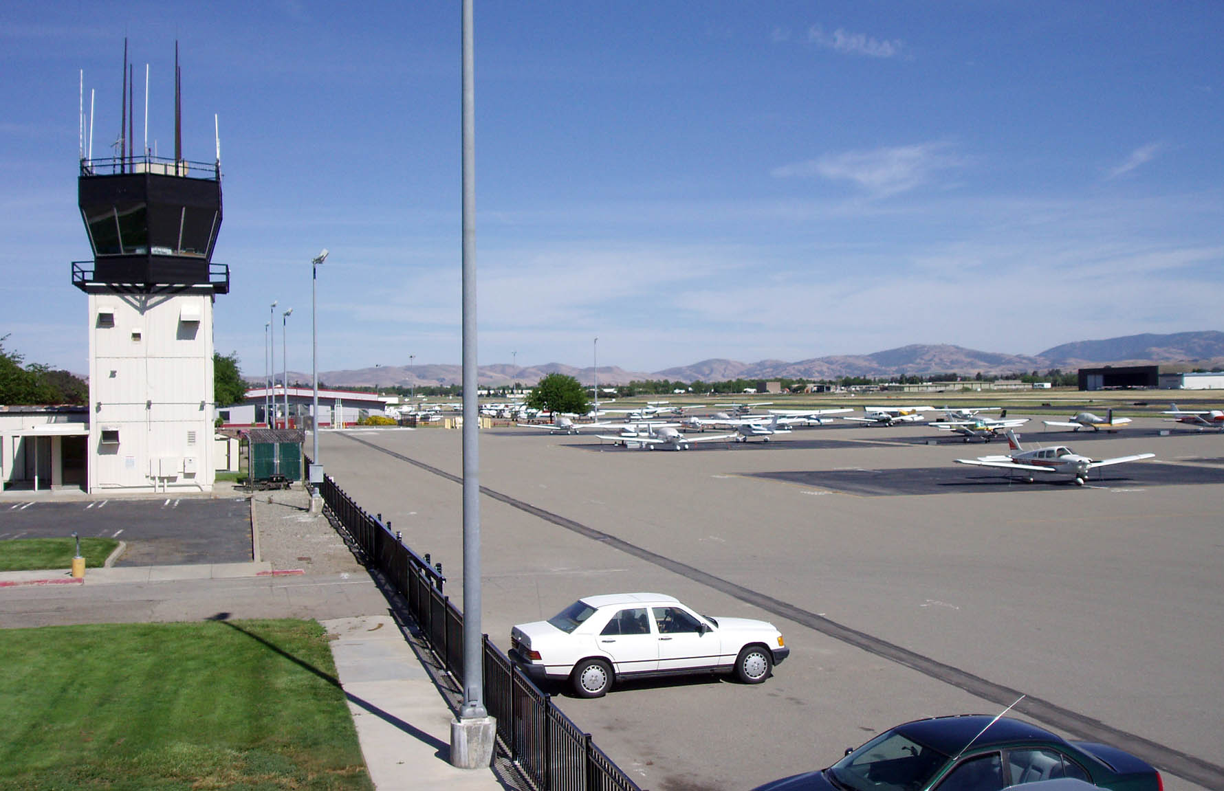 Livermore1